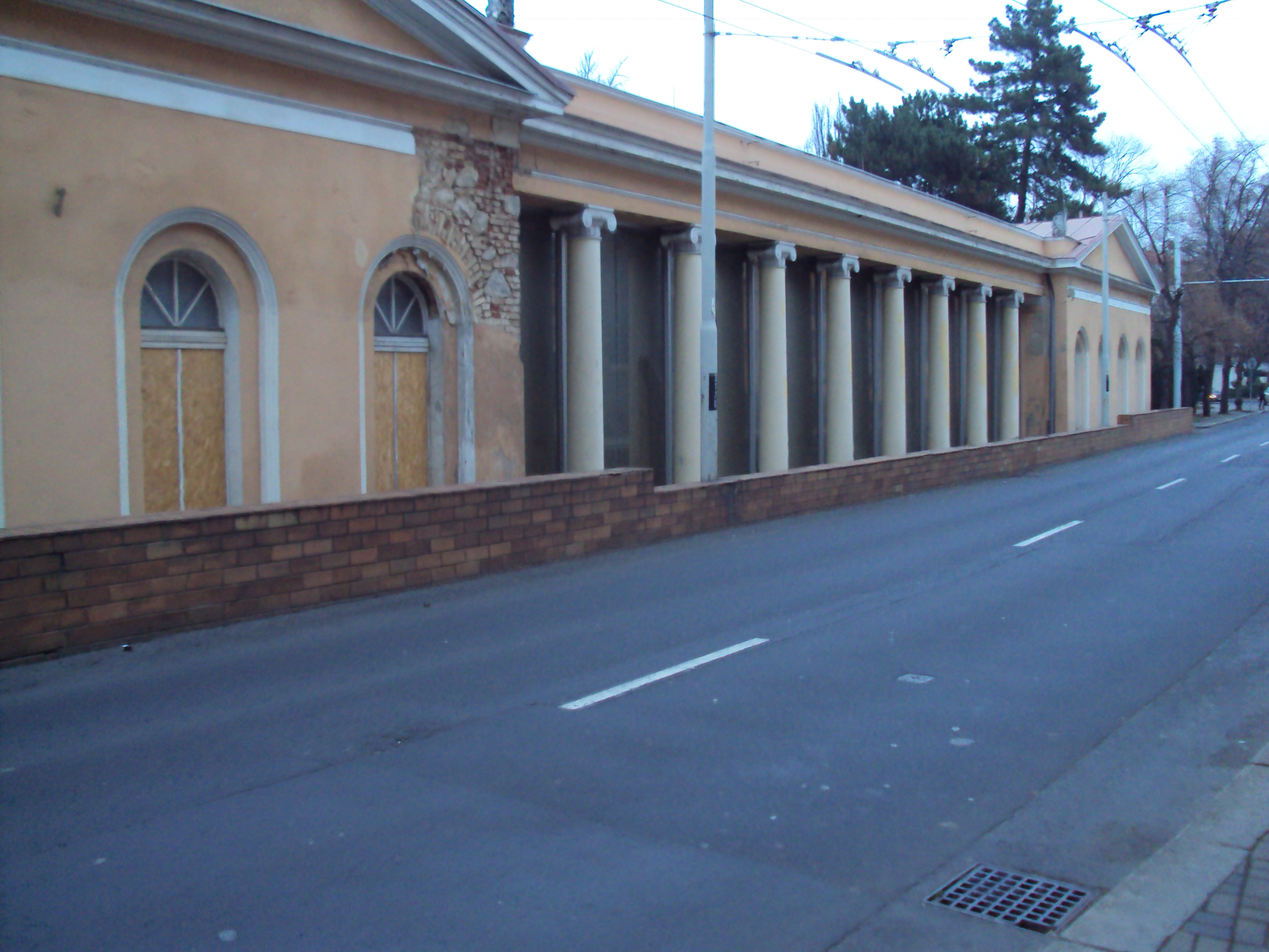 Česky: Hadí lázně v Šanově, zezadu od ulice